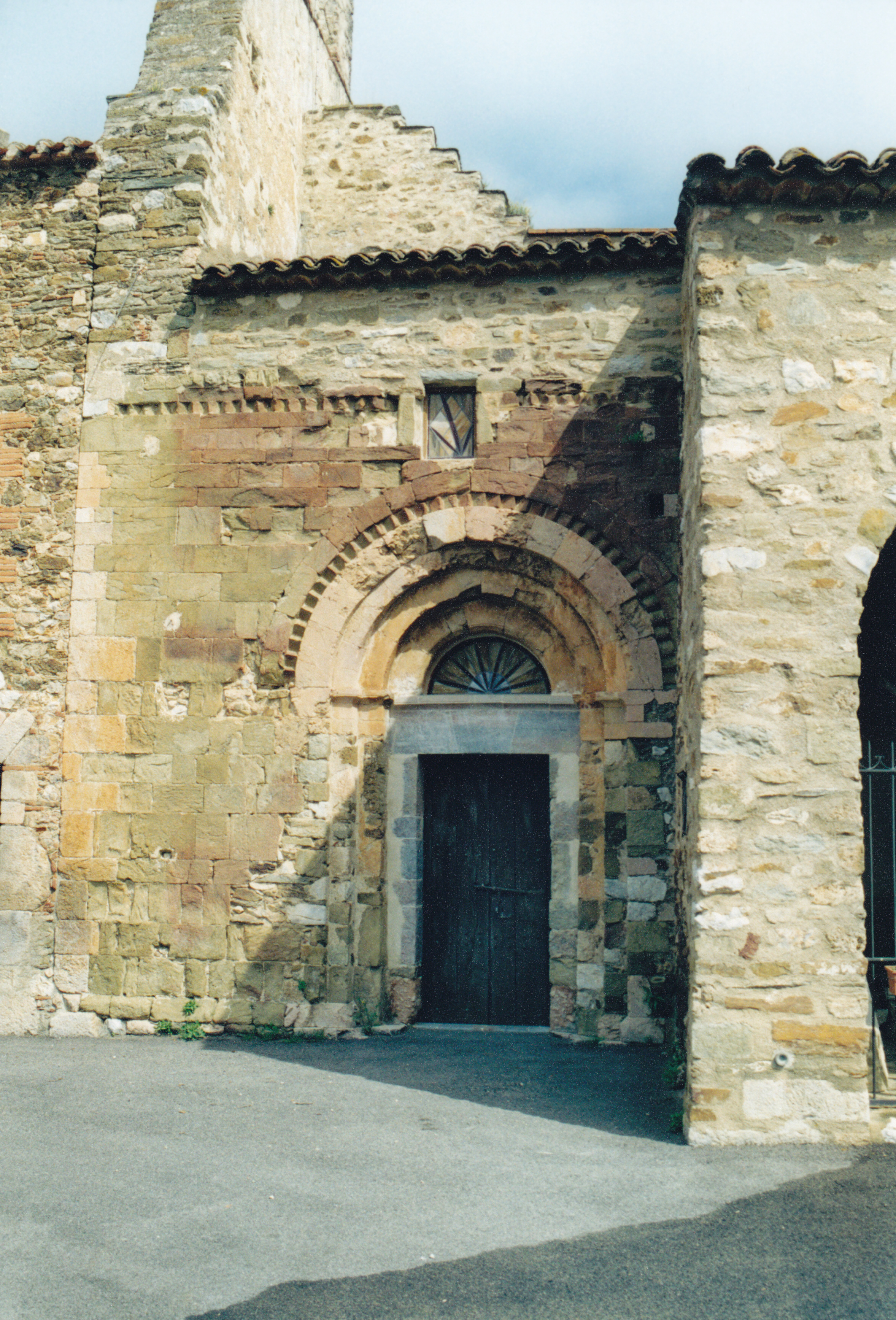 France - Pyrénées-Orientales - Aspres - Église Saint-Félix de Calmeilles